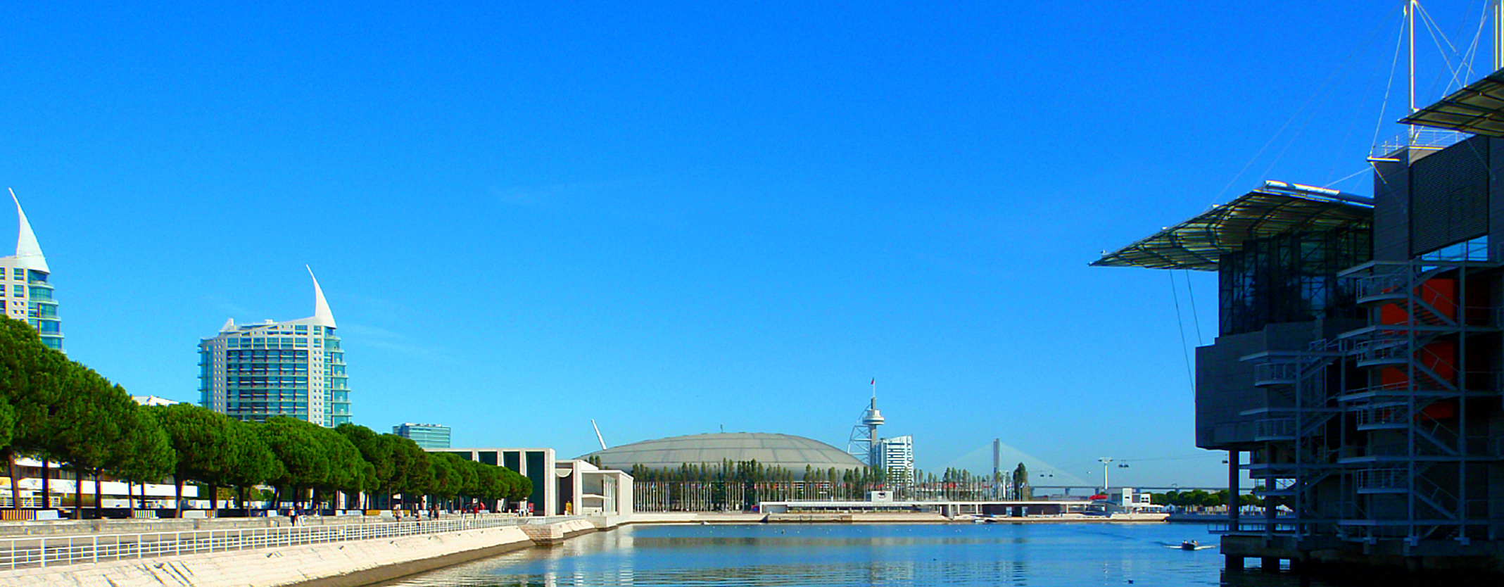 Lisboa (Portugal)